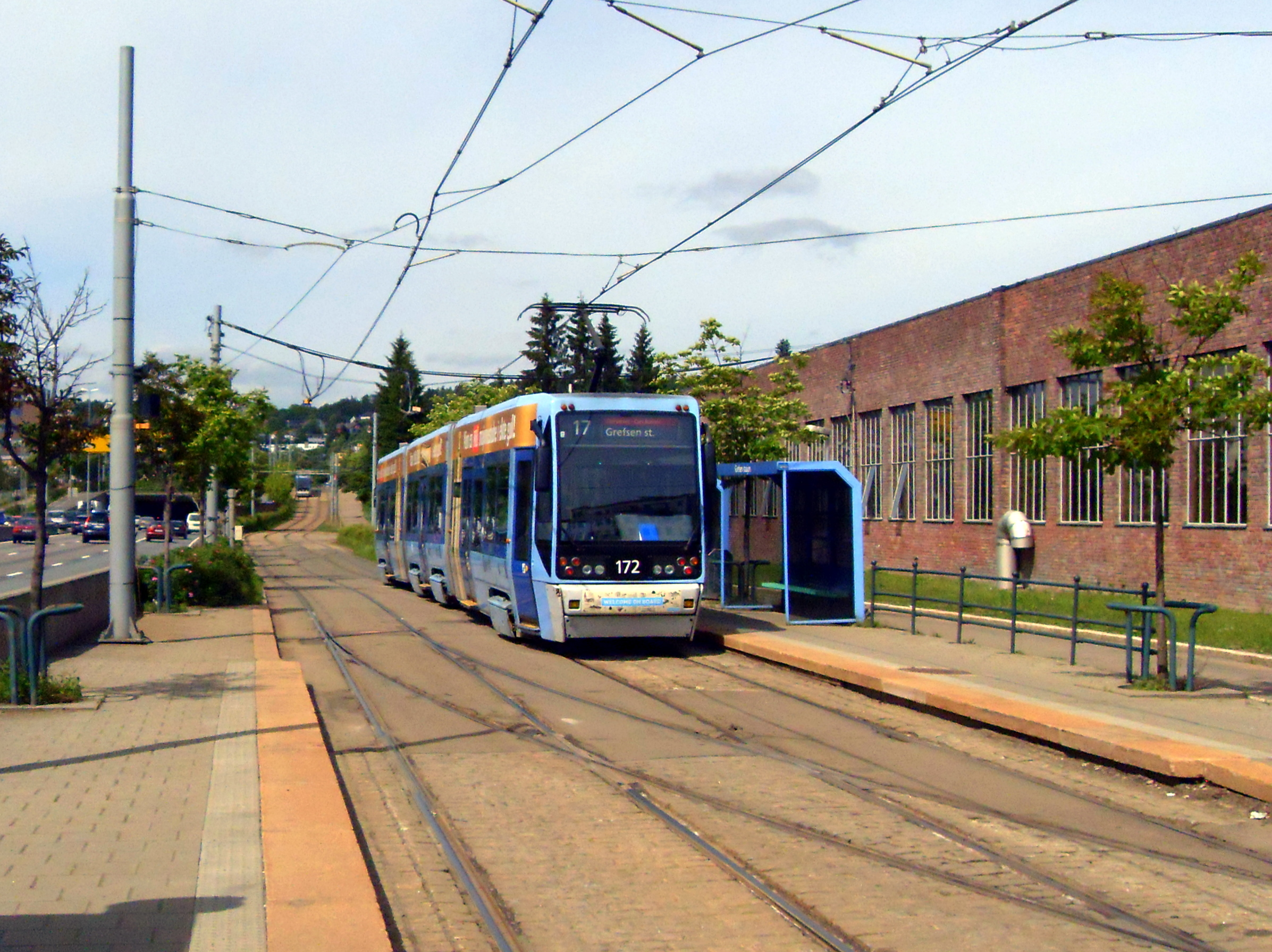 Tramwaj przy Grefsen stasjon w Oslo